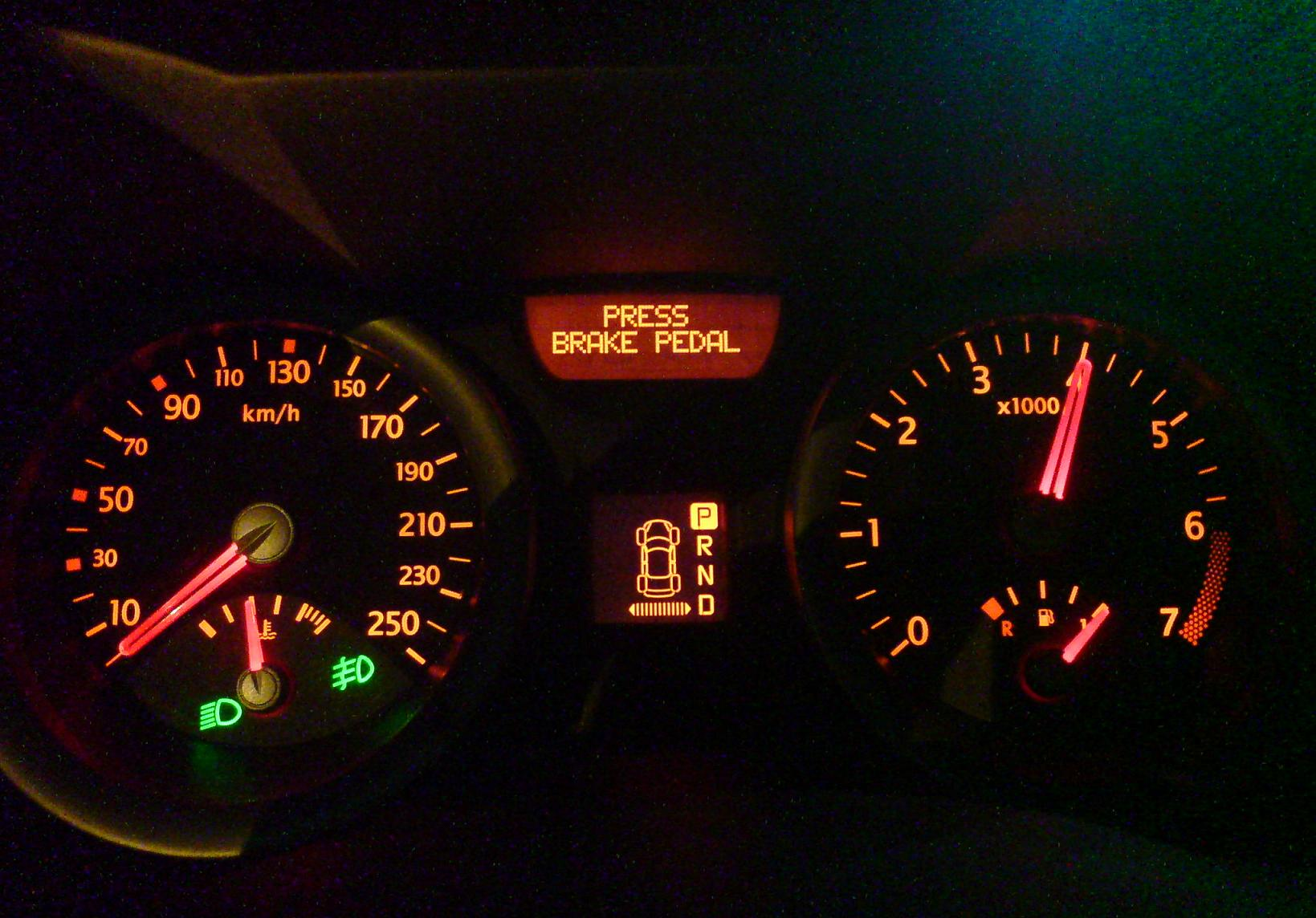 Renault Megane meters